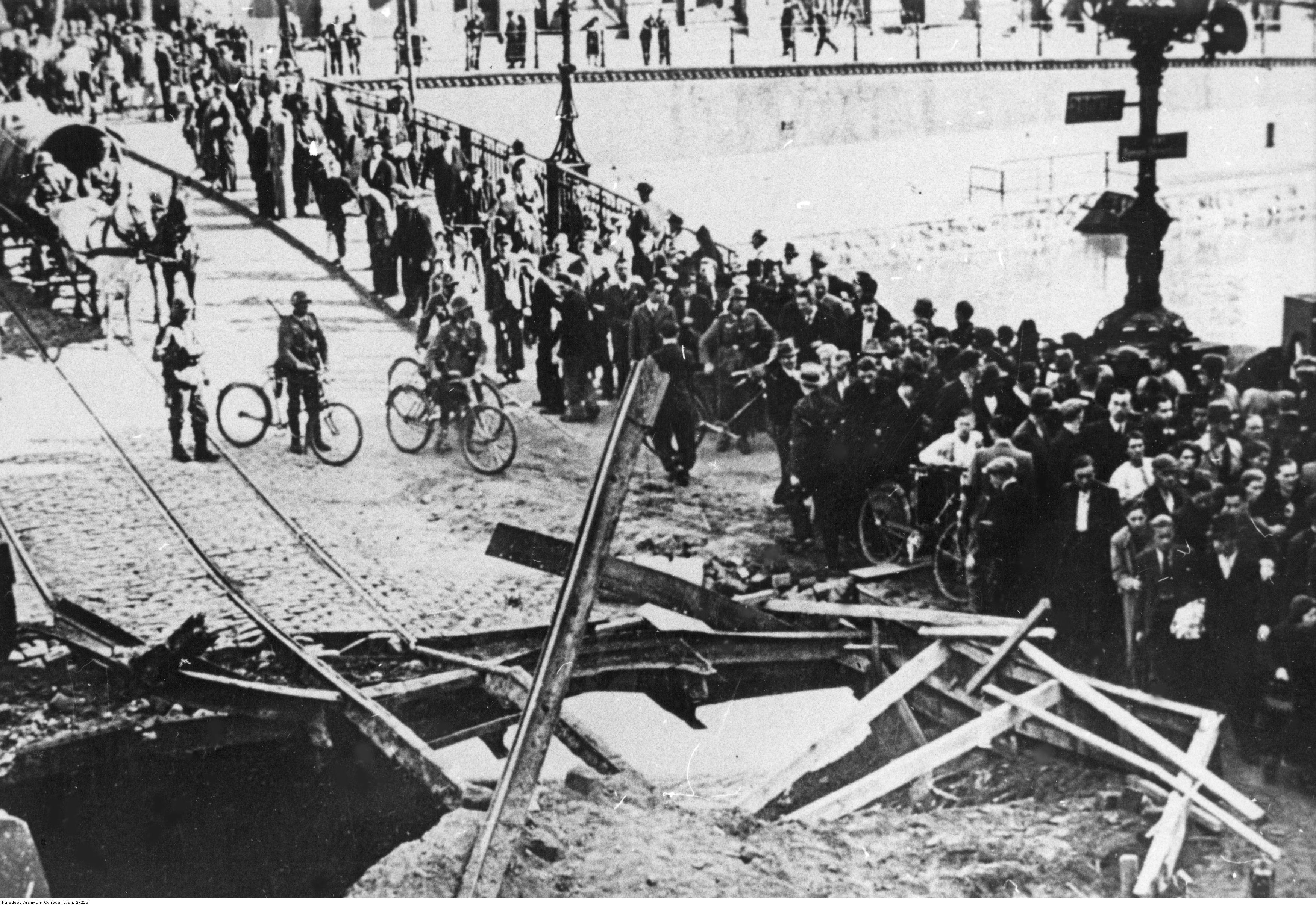 Wysadzony w powietrze przez Wojsko Polskie 4 IX 1939 most im. Romana Dmowskiego w Bydgoszczy (obecny most Staromiejski im. Jerzego Sulimy-Kamińskiego). Widoczny tłum ludzi i żołnierze niemieccy na rowerach.